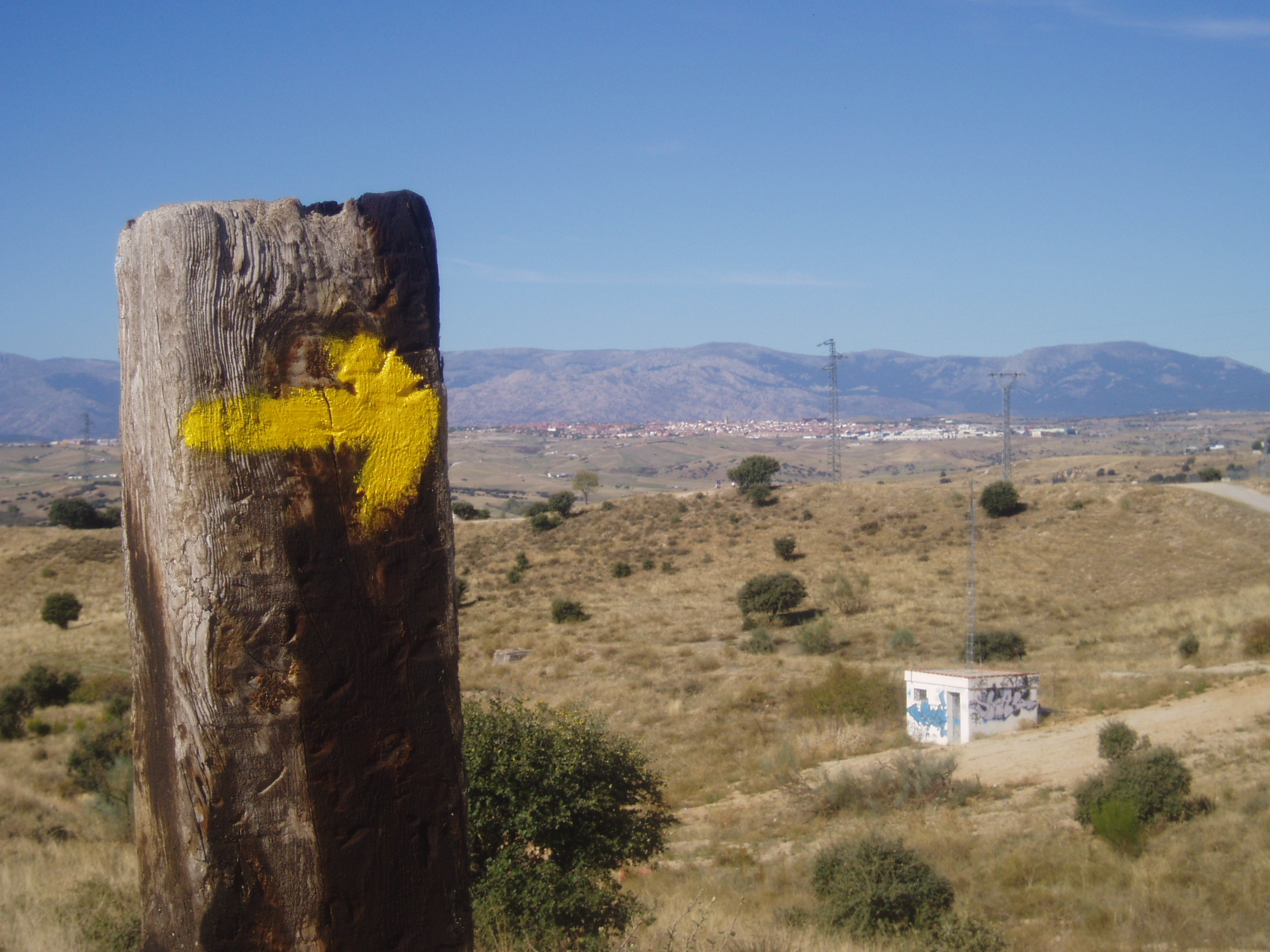 Colmenar Viejo. Camino de Santiago. Madrid. España.